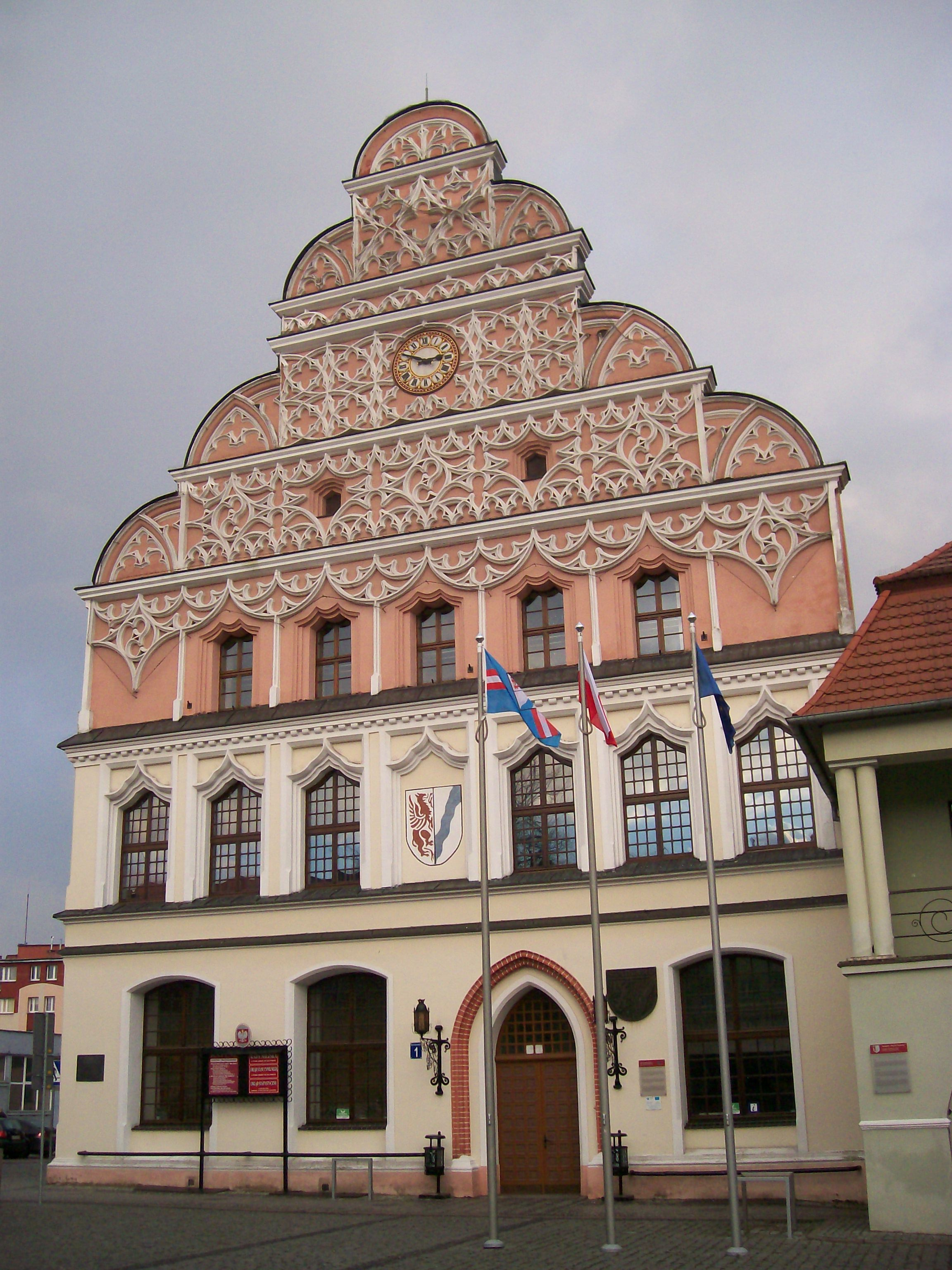 Ratusz Staromiejski w Stargardzie